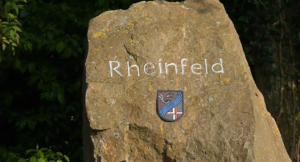 Stein mit Wappen und Gravur "Rheinfeld"; Stadtteil von Dormagen im Rhein Kreis Neuss